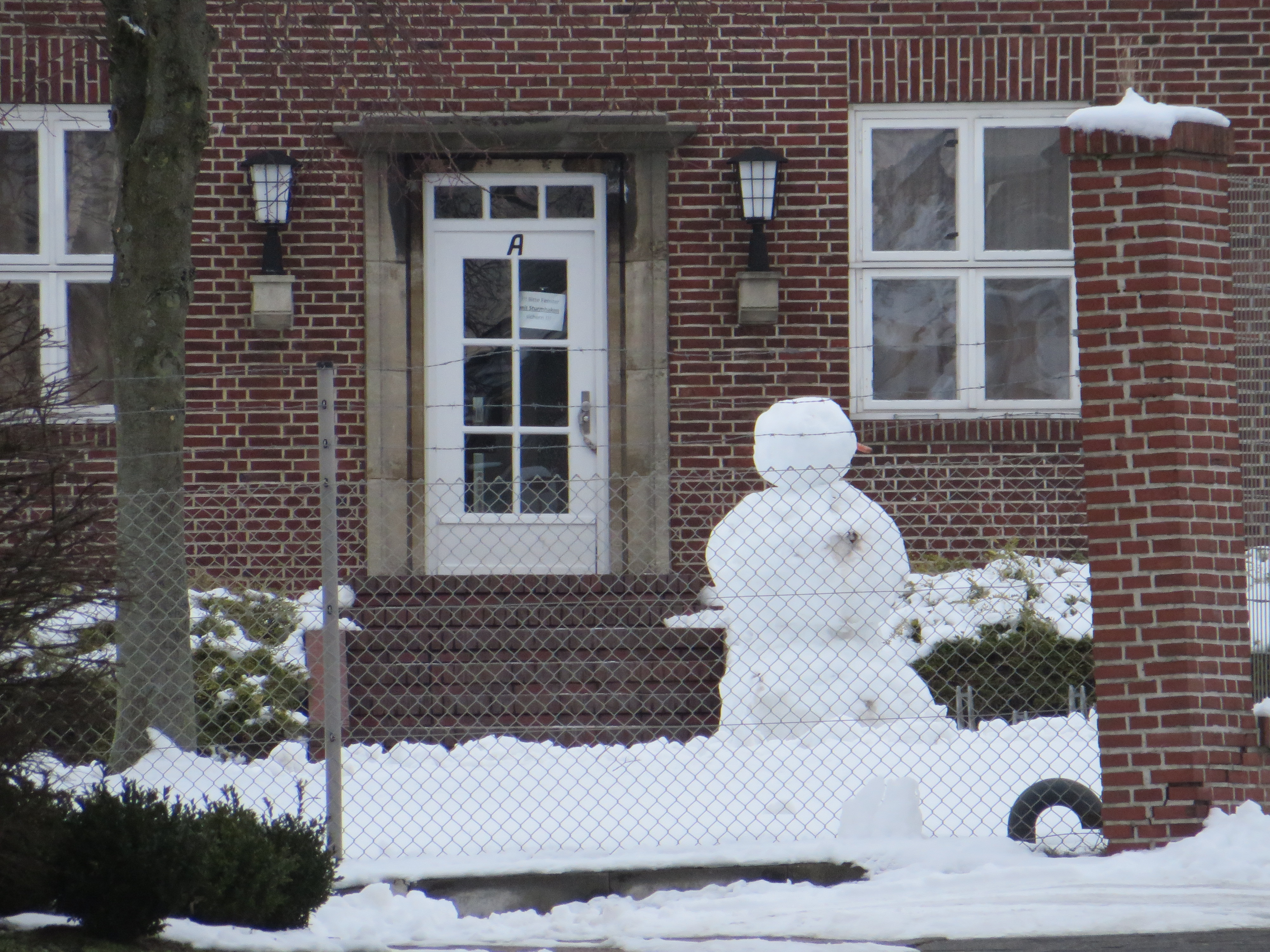 Schneemann vor Gebäude der Marinesportschule wo letzte Reichsregierung verhaftet wurde (Flensburg-Mürwik 2015), Bild 02